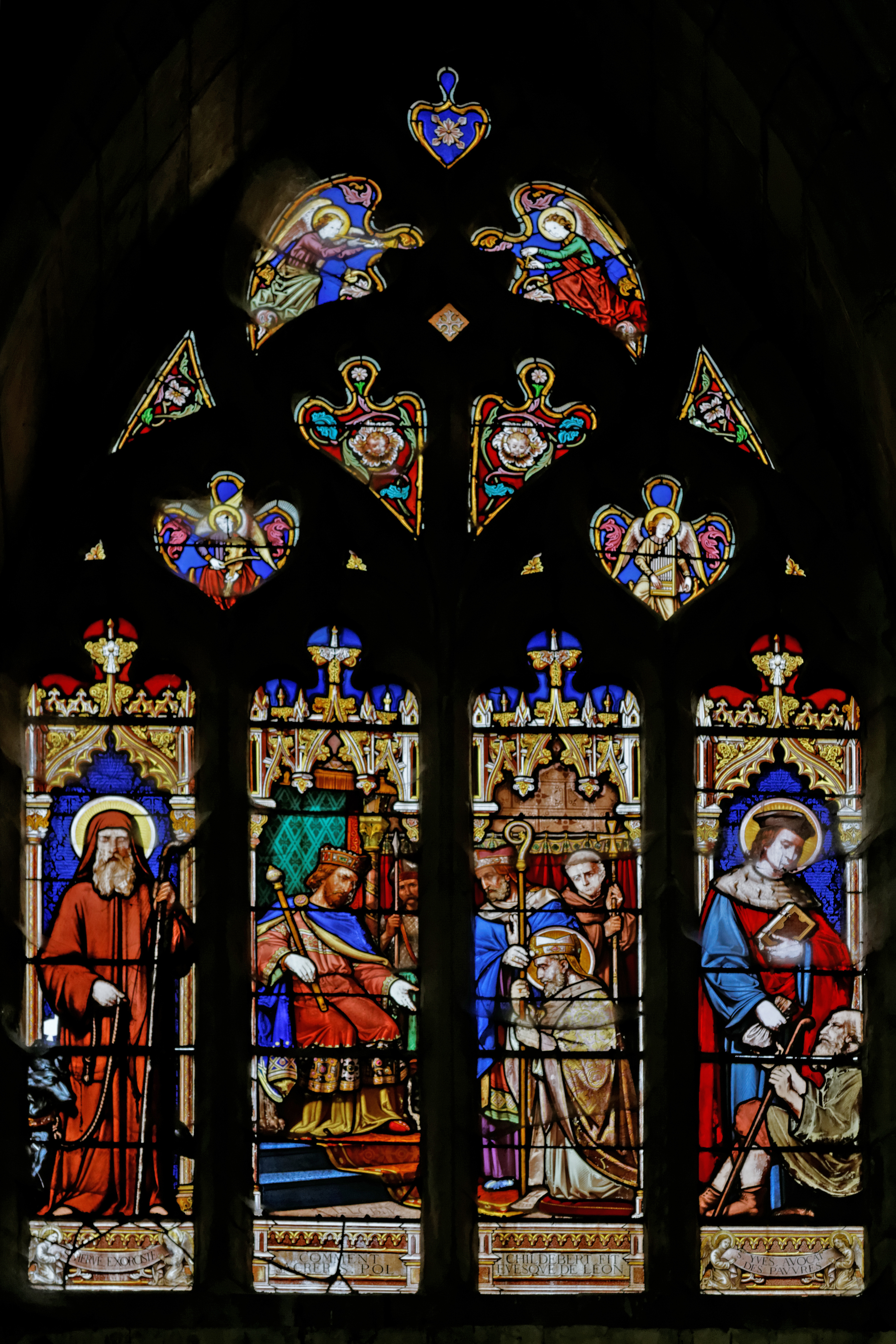 Vitrail de Lobin à droite du chœur de la cathédrale Saint-Paul-Aurélien de Saint-Pol-de-Léon, représentant « Comment Childebert fit sacrer St Pol évêque de Léon », scène entourée de saint Yves et saint Hervé. Au-dessus, des anges jouent avec des instruments de musique (violon, harpe).